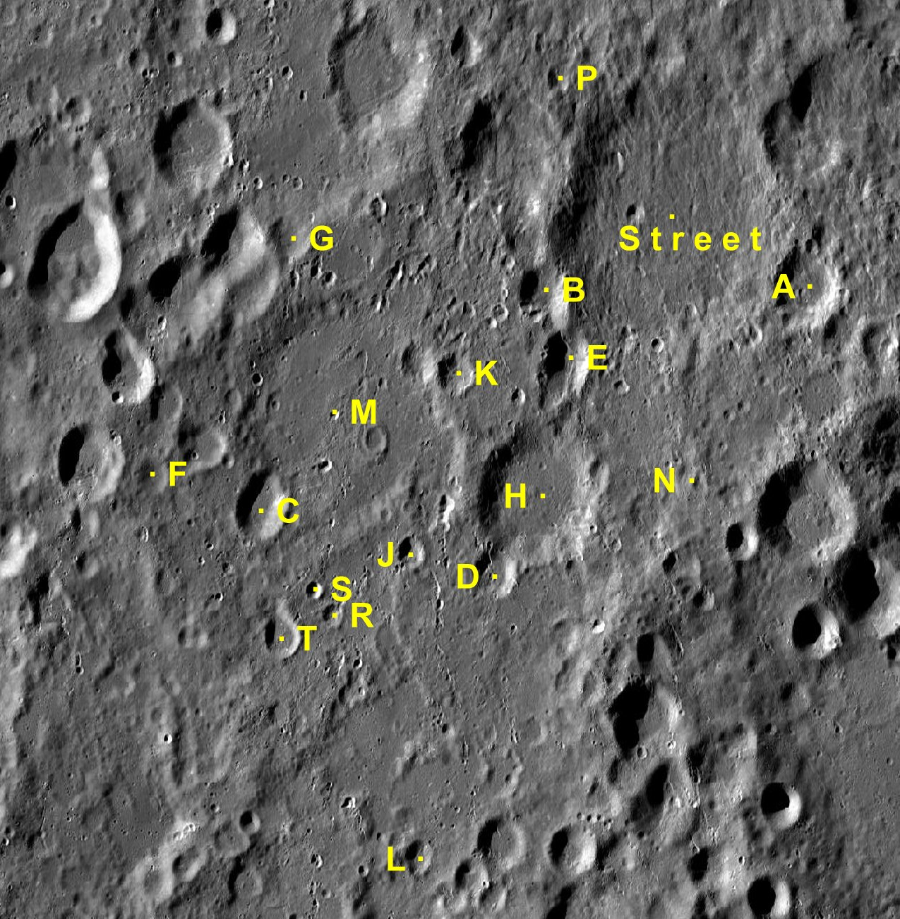 Cráter lunar Street. Cráteres satélite. (Imagen LRO)